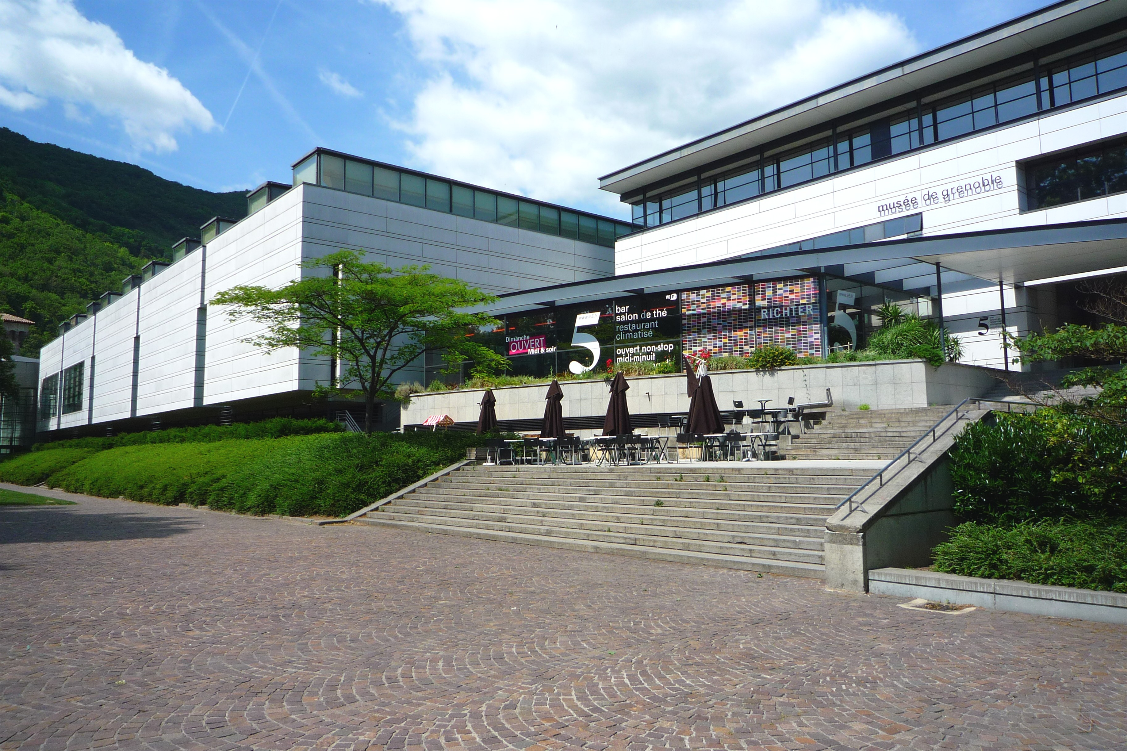 musée de Grenoble (France)